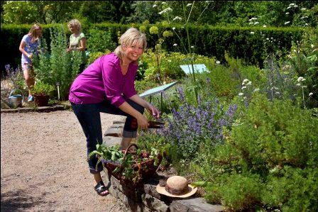 Erkundung des Apothekergartens